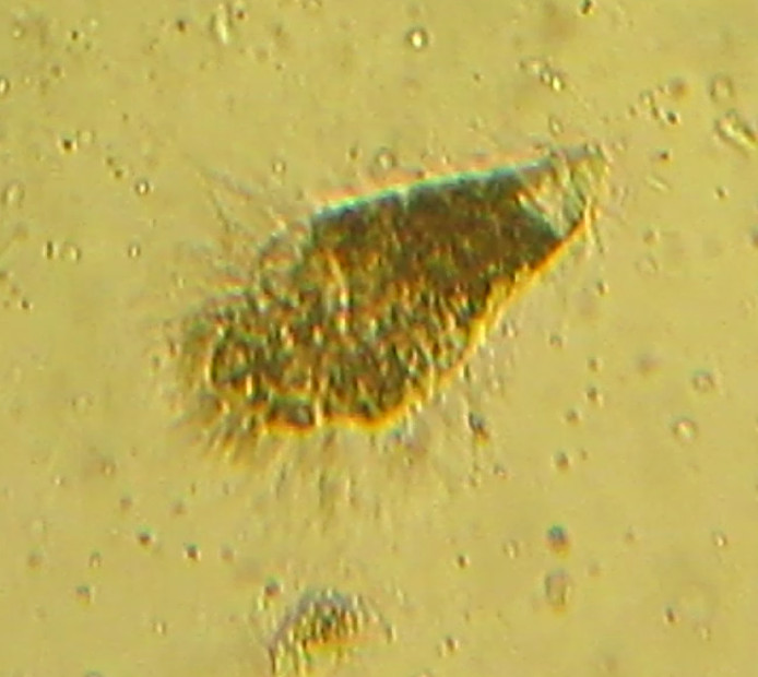 Simbionte de cupim.